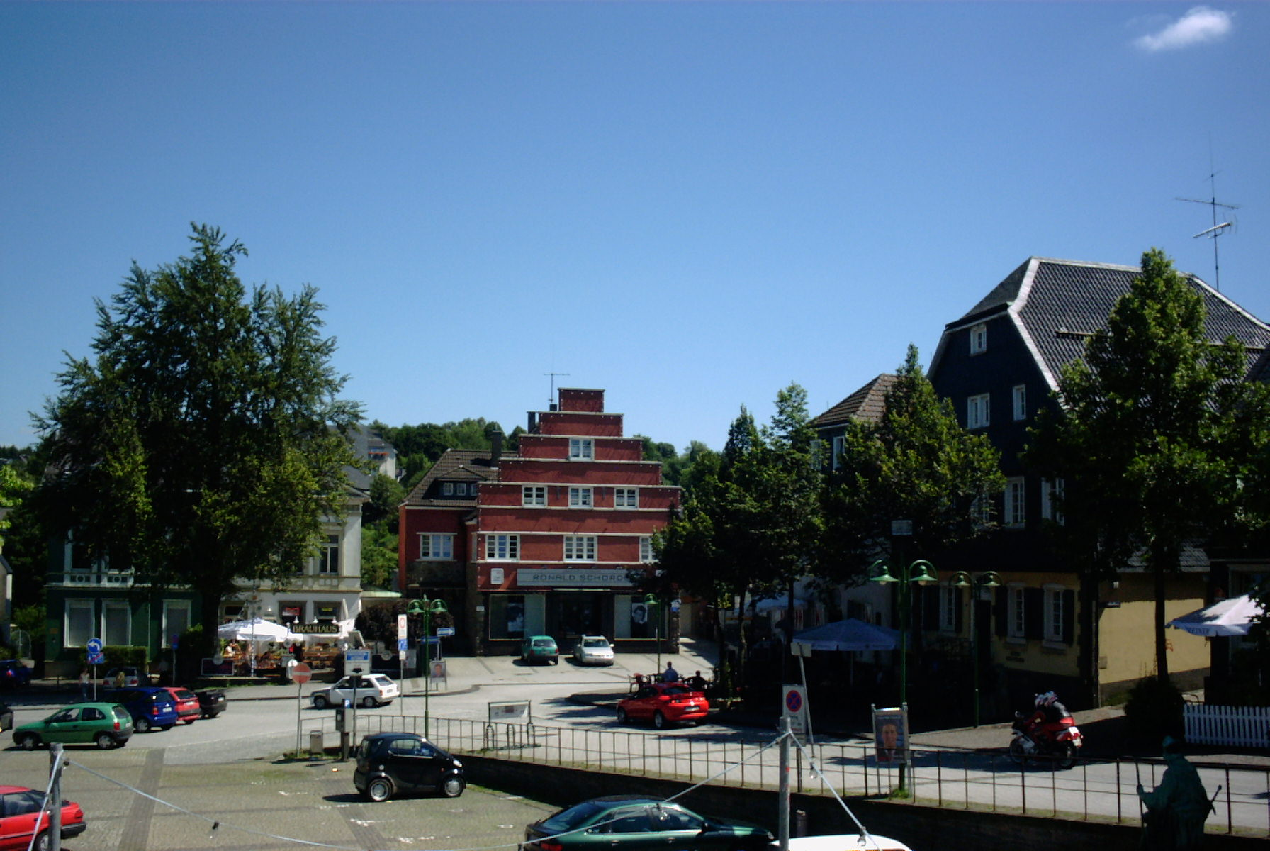 Beschreibung: Wipperfürth, Wipperfürth, Wipperfürth Author: J. Berger Genehmigung liegt Benutzer:Trexer vor. Zitat: "Ich erhebe keine (keinerlei) Rechte an diesen Fotos. Jeder darf sie zu jedem gesetzlichen Zweck benutzen, wie er mag." Citation: " I raise none rights in these photos. Everybody may use them for every lawful purpose as he may. "